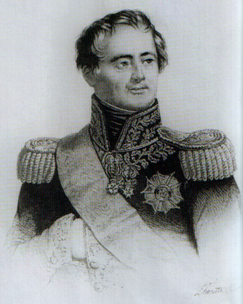 Général Charles Mathieu Isidore Decaen (1769-1832)